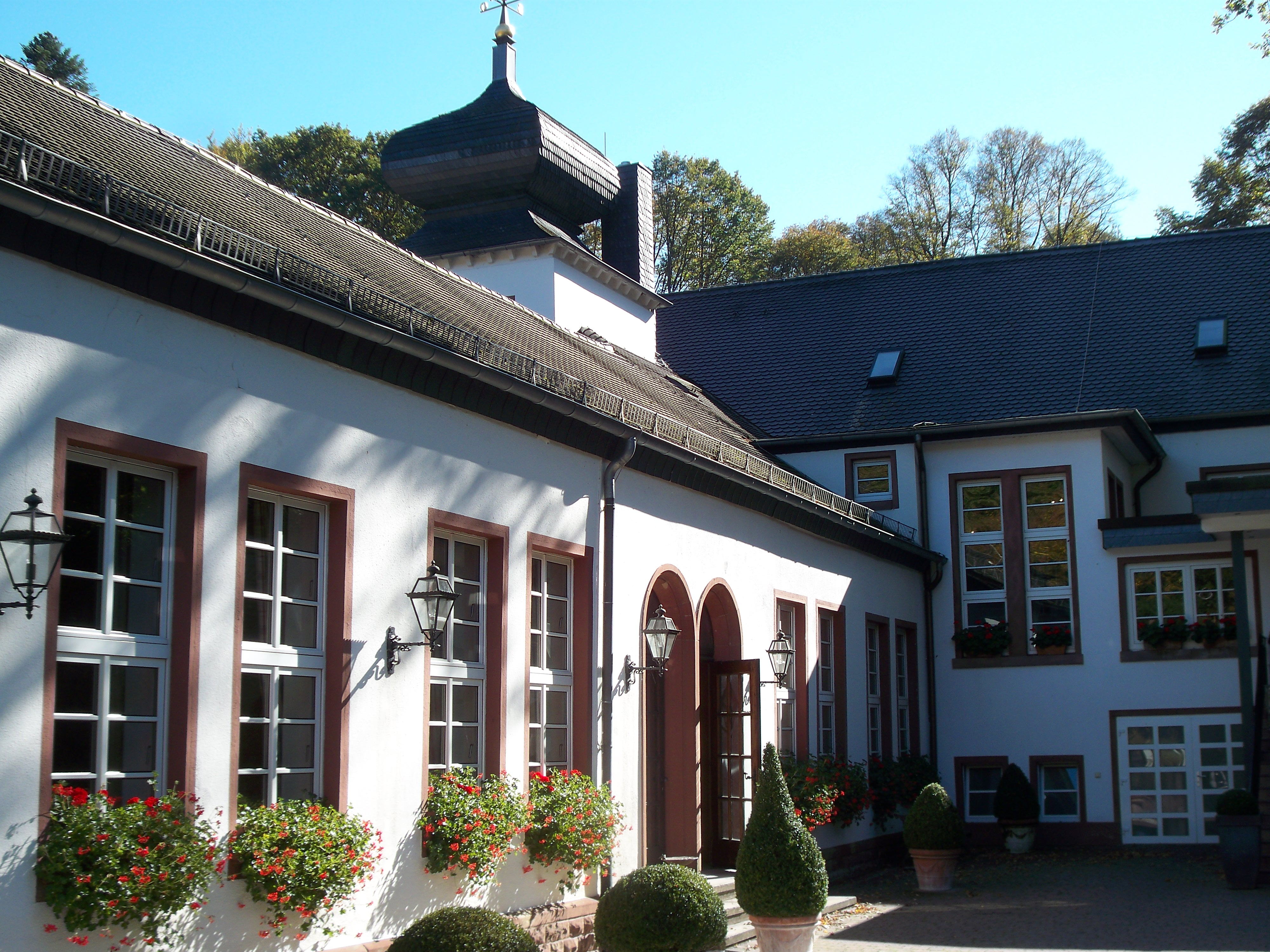 Tschifflik Zweibrücken - obiekt architektury barokowej w Nadrenii Palatynacie